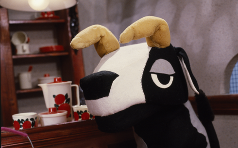 Greta Bontekoe uit de Fabeltjeskrant